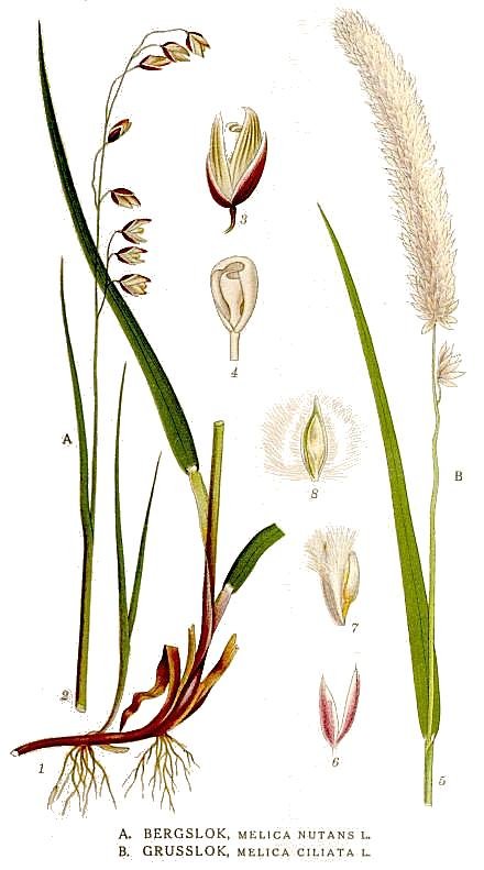 A. Melica nutans L. B. Melica ciliata L. Original Description A. "Bergslok", Melica nutans L. B. "Grusslok", Melica ciliata L.